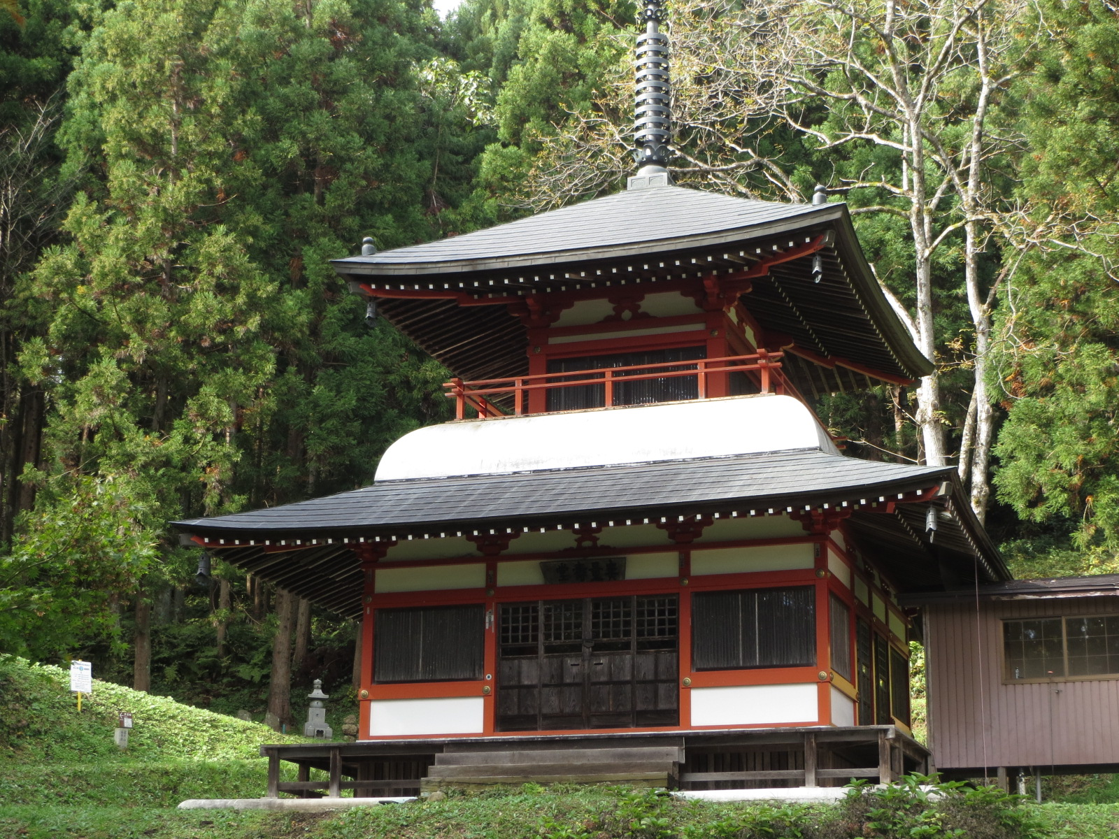 北上市にある極楽寺